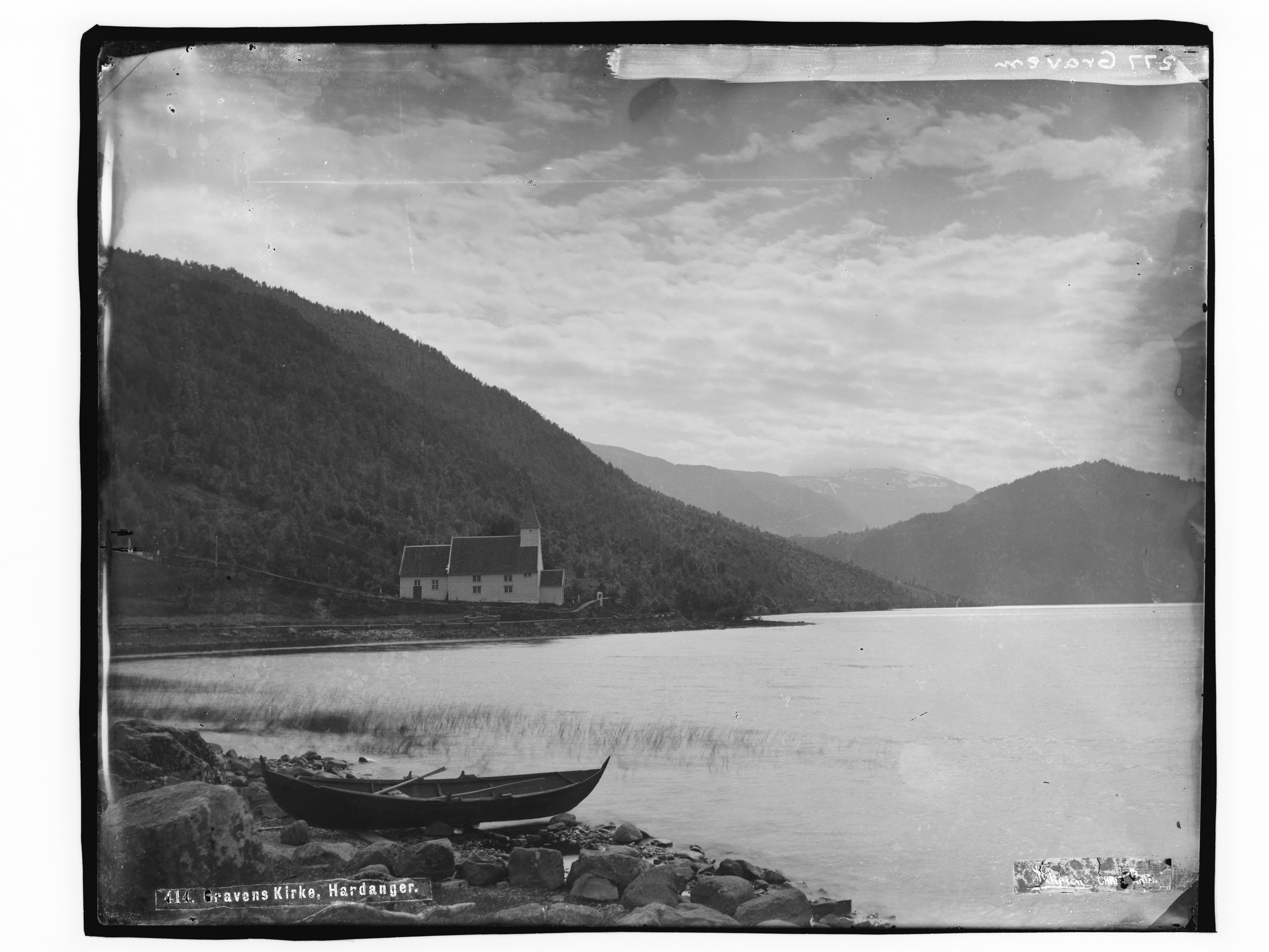 Påskrift negativ: 414. Gravens Kirke, Hardanger. Skøien Christiania. Påskrift negativ: 277 Graven Påskrift konvolutt: A-277 Granvin kirke. Eksteriør. [Riksantikvaren] Sted: Granvin,Granvinsvatnet,Hardanger Kommune: Granvin Fylke: Hordaland Tagger: Granvin kirke eksteriør landskap vann robåt